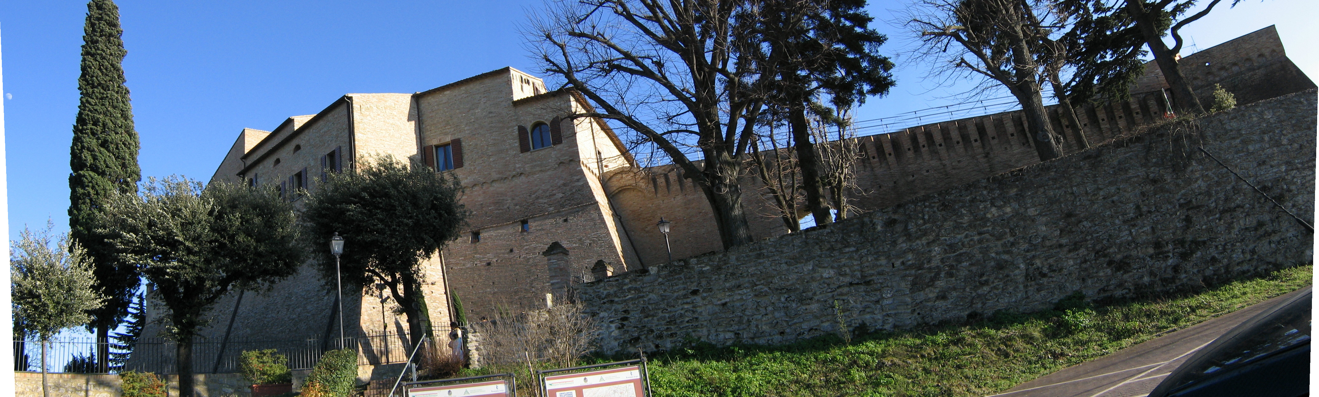 Rocca Bertinoro (FC), Italy